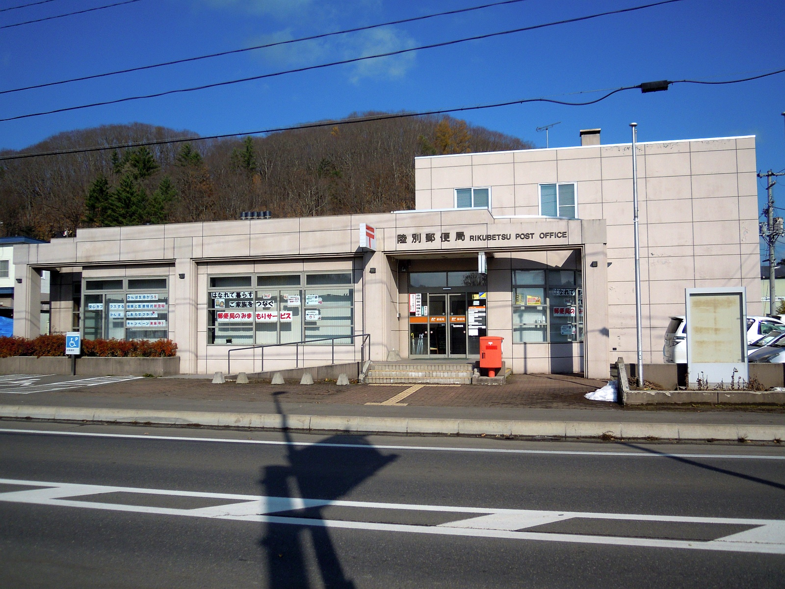 北海道足寄郡陸別町にある陸別郵便局の庁舎外観